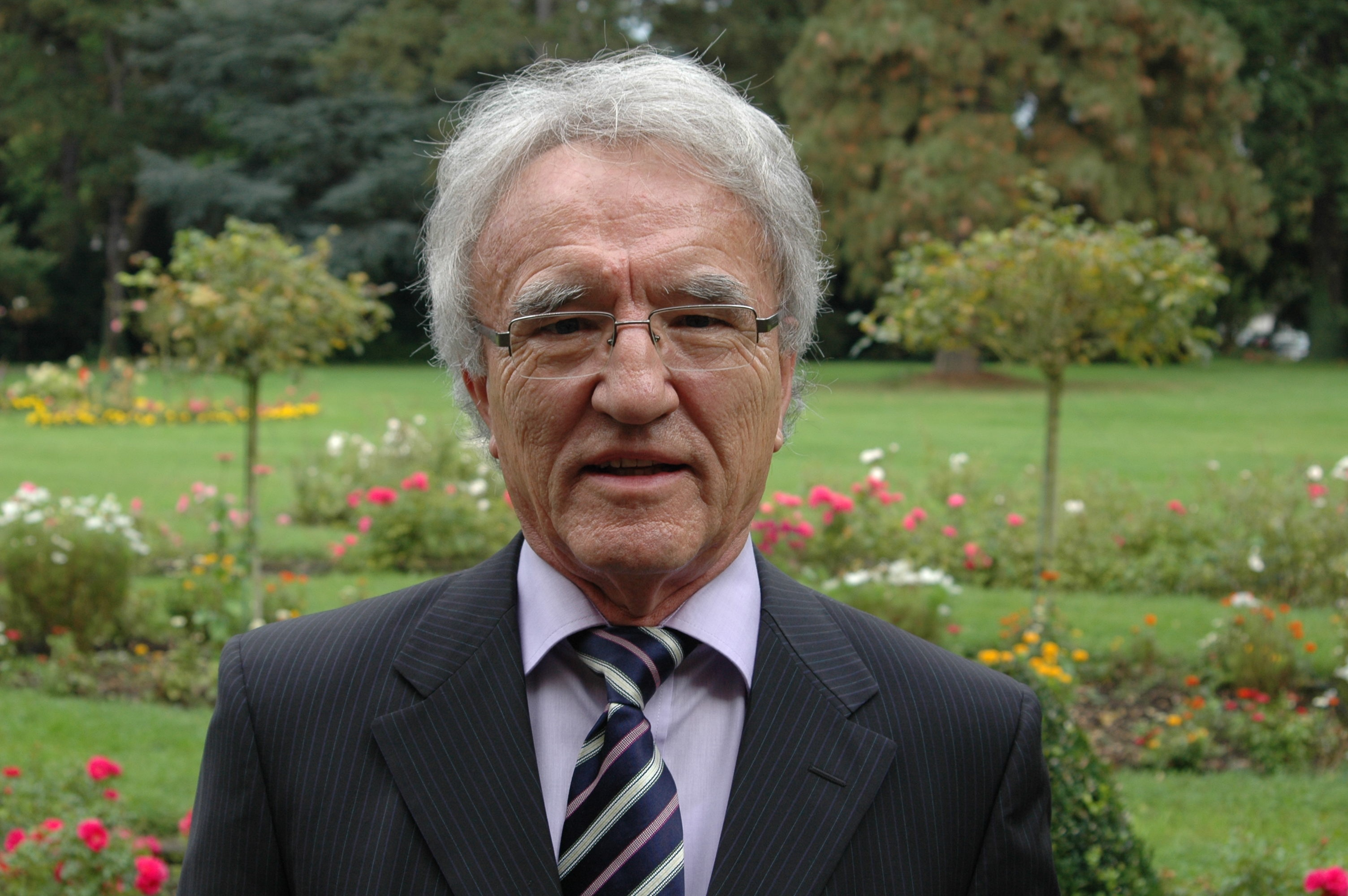 Horst Teltschik bei einer Tagung der Carl Friedrich von Weizsäcker Stiftung im Generalkonsulat der Russischen Föderation in Bonn